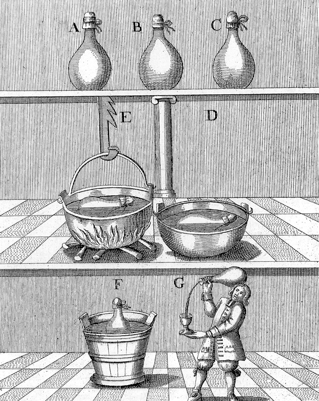 Mineralwasserversand Ende des 17. Jahrhunderts aus Franciscus Blondel: "Außführliche Erklärungen und augenscheinliche Wuderwürckungen deren heylsamen Badt- und Trinkwässern zu Aach. 1688". Das Mineralwasser wurde vor dem Verzehr erneut erwärmt und heiß getrunken.